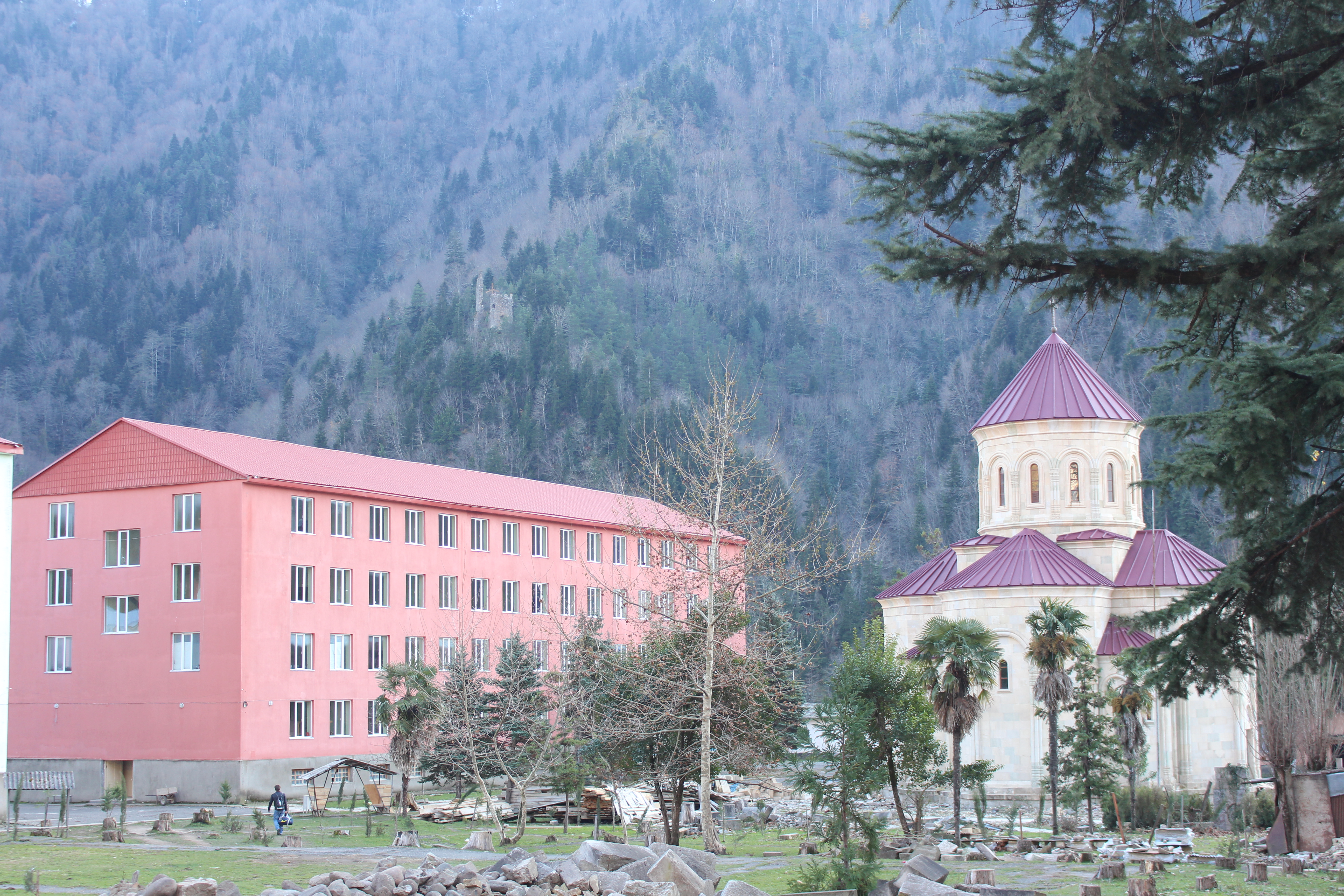 საქართველოს საპატრიარქოს წმიდა ტბელ აბუსერისძის სახელობის სასწავლო უნივერსიტეტი, შუახევის მუნიციპალიტეტი